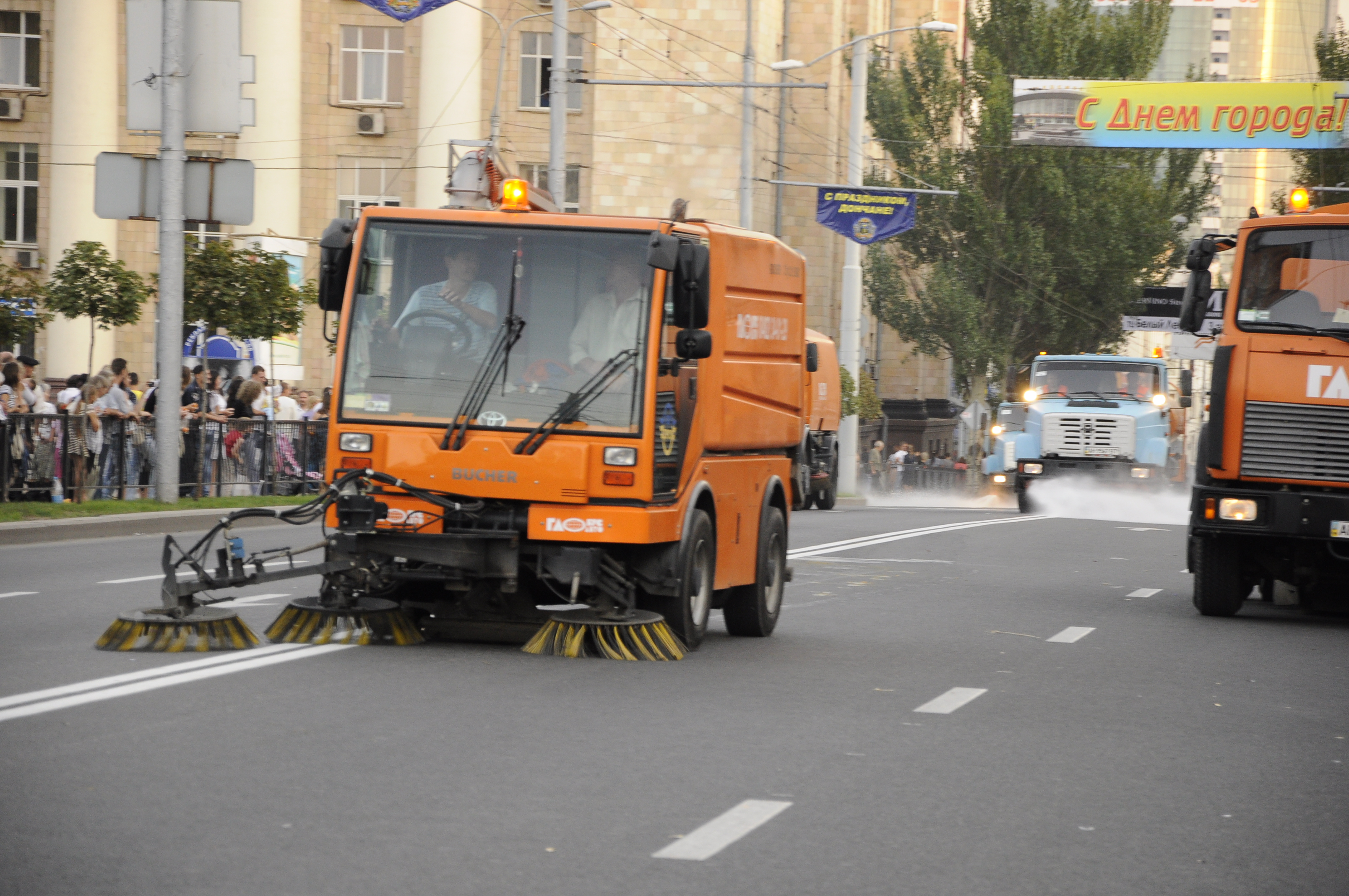 Донецк. День города. Карнавал.